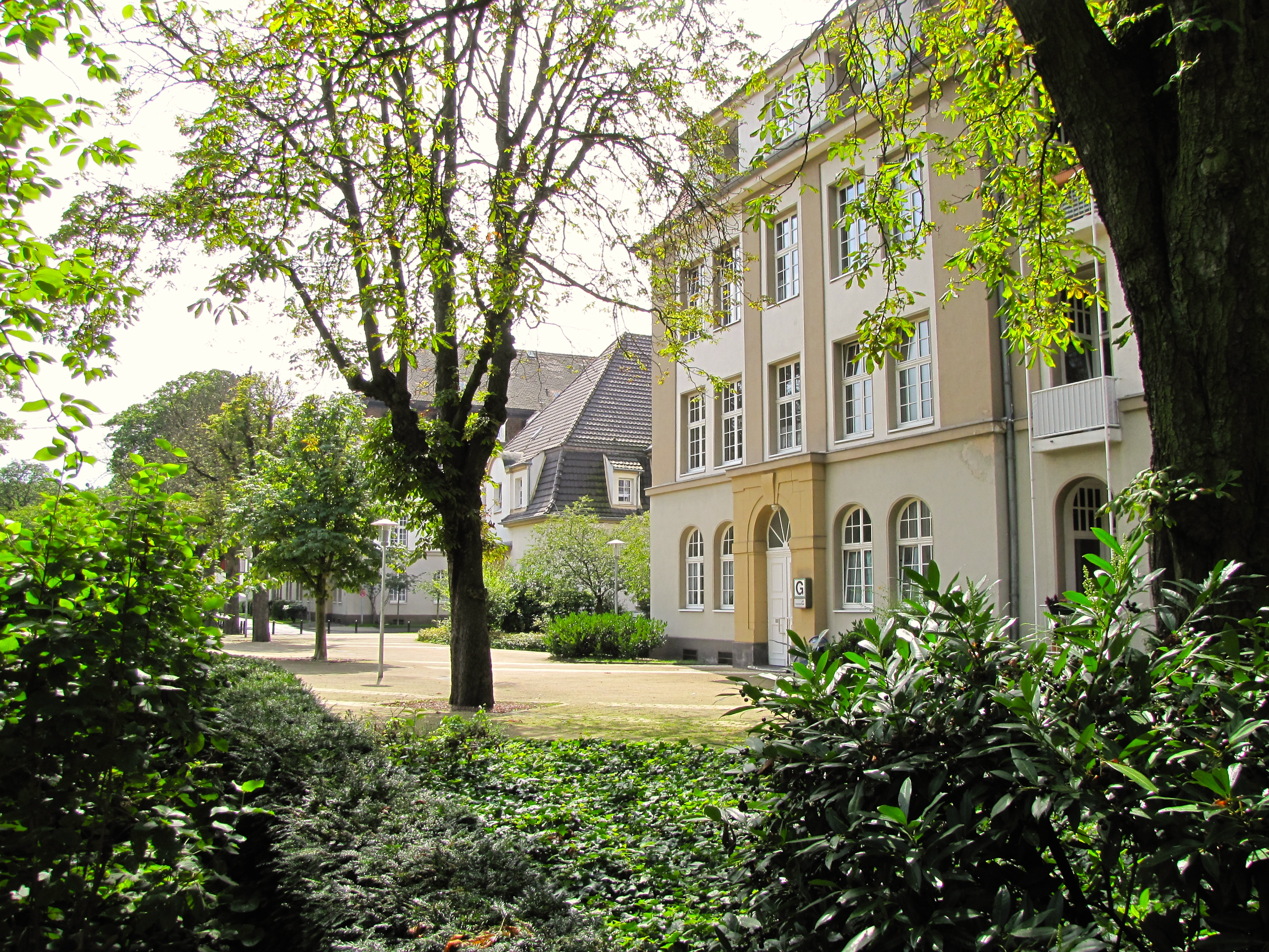 Köln Riehl: Die Riehler Heimstätten wurden 1927 auf dem Gelände der ehemaligen Kasernen an der Boltensternstraße gegründet. Heute Sozialbetrieb Köln gGmbH.